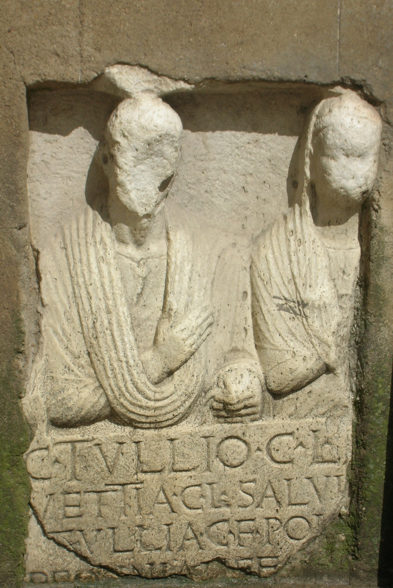 Bassorilievo Romano, Venosa (PZ)